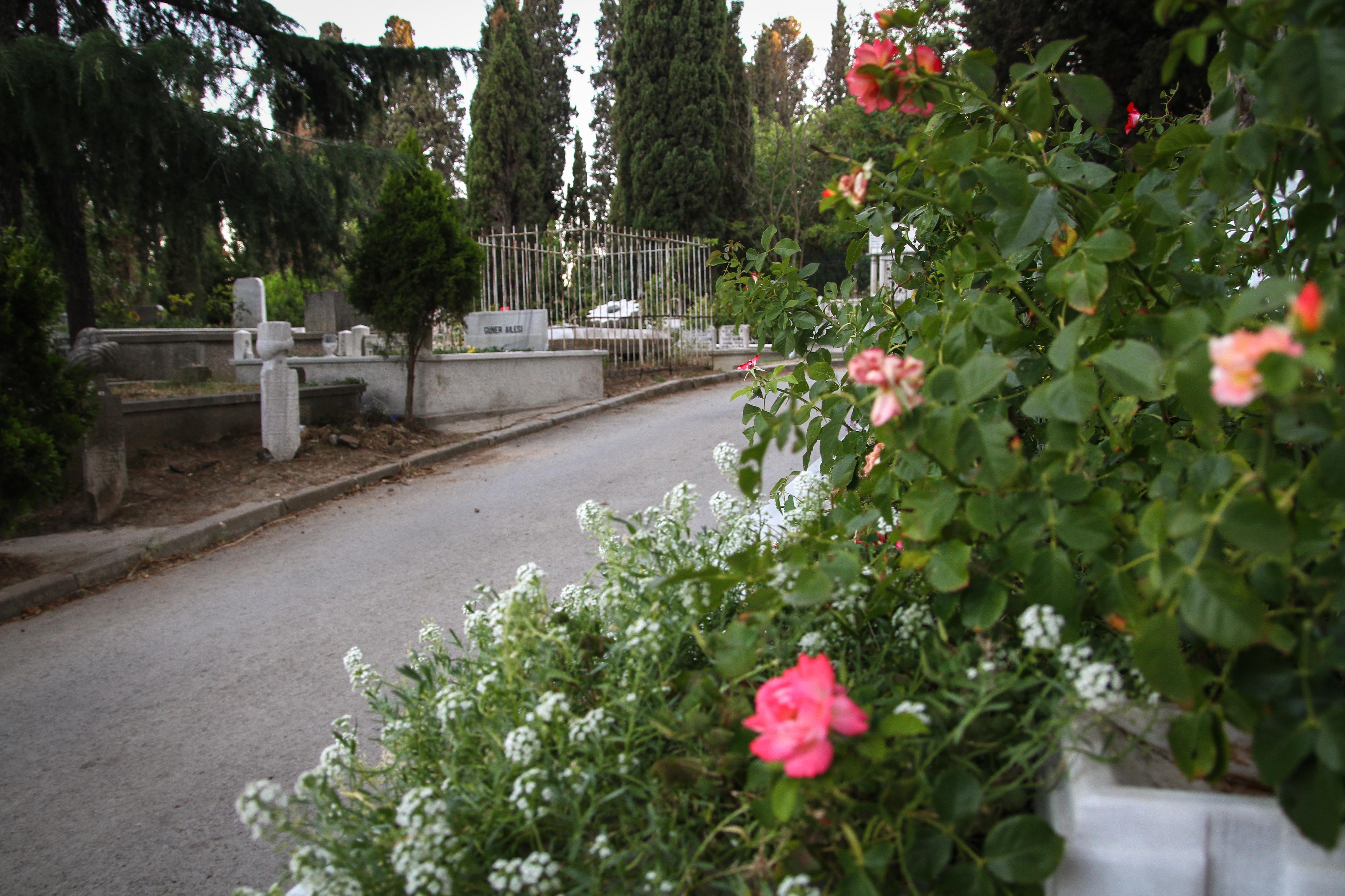 Karaca Ahmet Sultan mezarlığı